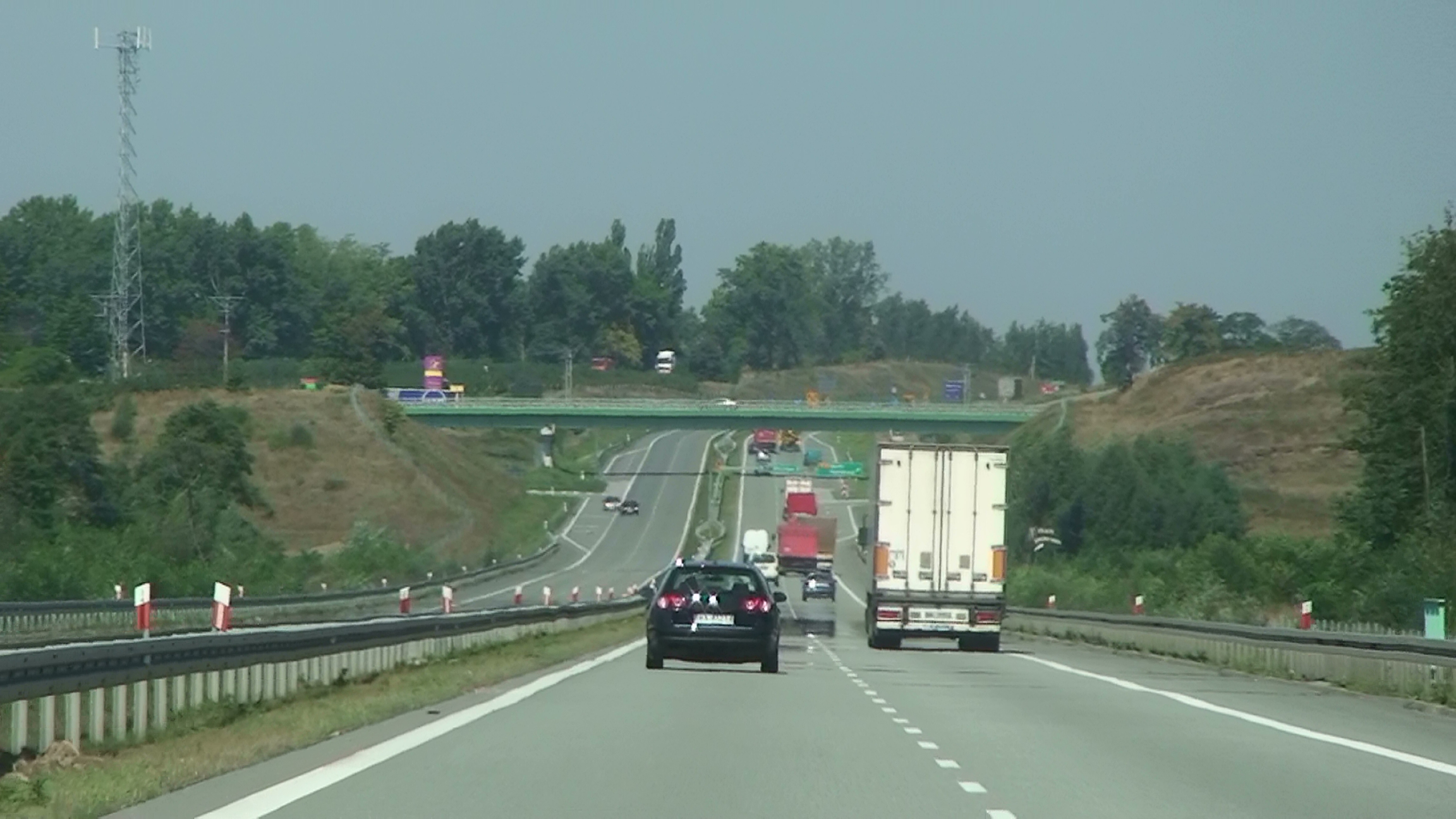 Droga ekspresowa S7 - obwodnica Białobrzegów